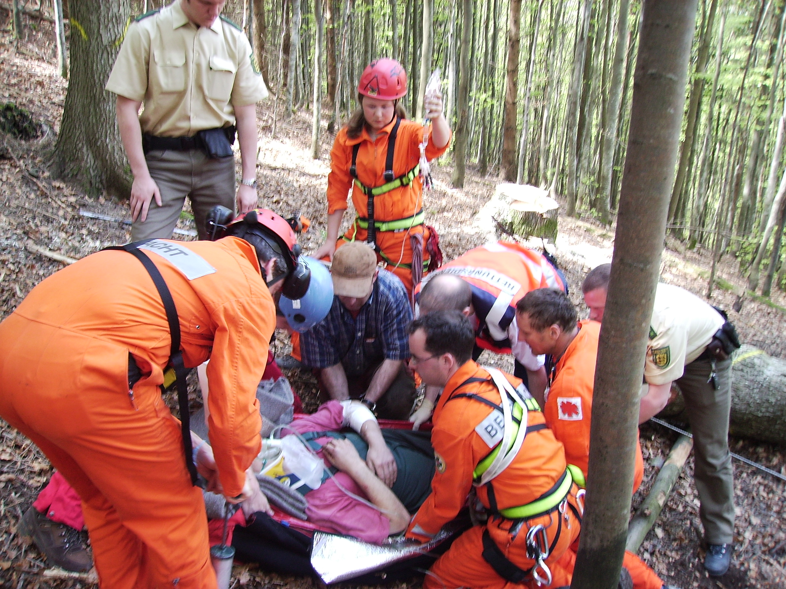 Einsatz der Bergwacht Freiburg (Waldarbeiterunfall), Zusammenarbeit mit anderen Rettungsorganisationen Mountain Rescue Freiburg (Germany) rescuing a lumberjack met with an accident. Other aid organizations participating.